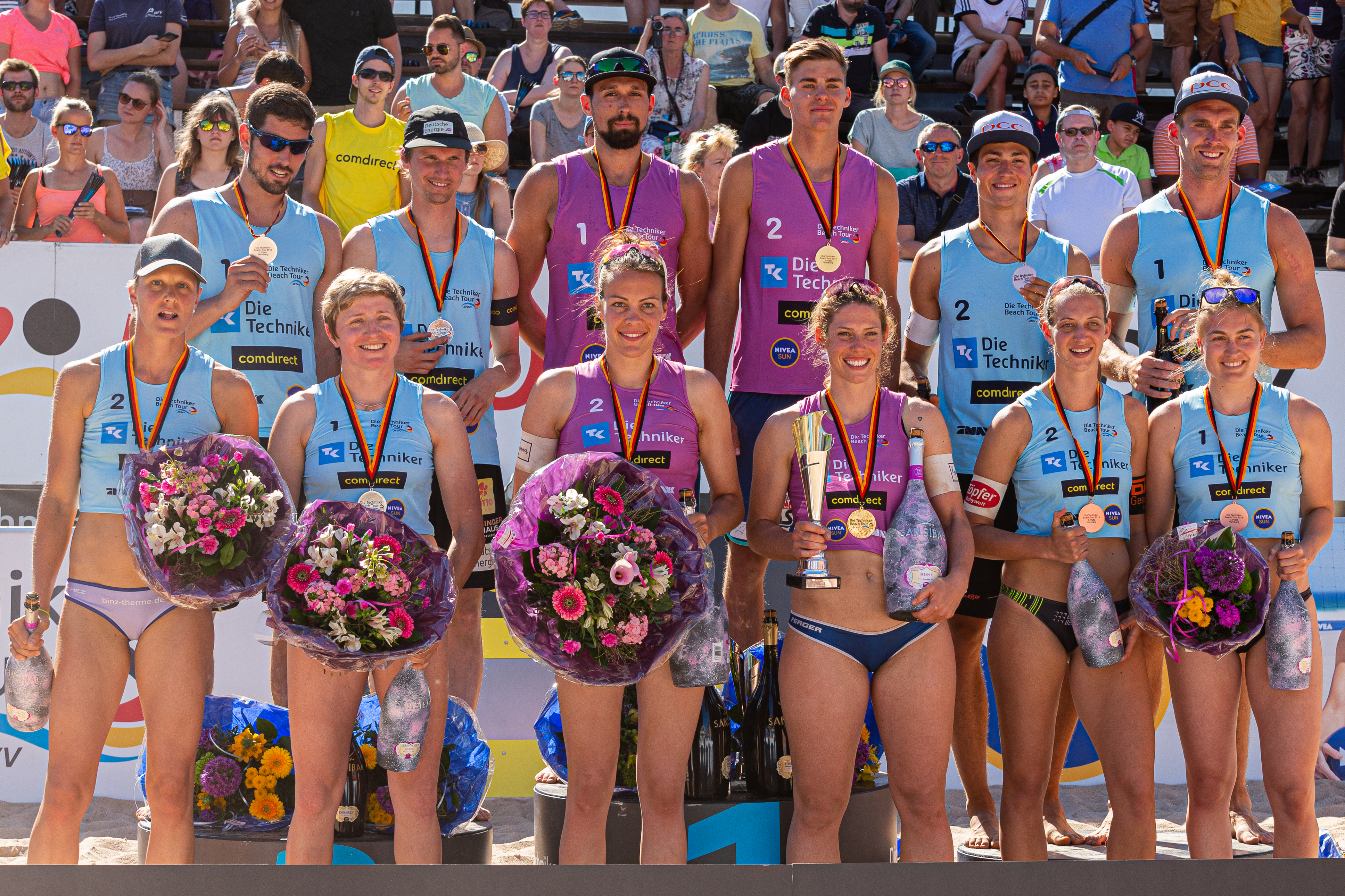 BeachVolleyball, Die Techniker beach tour Nürnberg; oben v.li.: Manuel Lohmann (TGM Mainz-Gonsenheim), Jonas Schröder (Deutsche Energie Beachteam - United Volleys Frankfurt), Jonathan Erdmann (VCO Berlin), Max Betzien (VCO Berlin), Sven Winter (DJK TuSA 06 Düsseldorf), Alexander Walkenhorst (DJK TuSA 06 Düsseldorf); unten v.li.: Elena Kiesling (SV Lohhof), Melanie Gernert (SV Lohhof), Christine Aulenbrock (VfL Oythe), Sandra Ferger (VfL Oythe), Natascha Niemczyk (TV Dingolfing), Lisa Arnholdt (DJK Schwäbisch Gmünd); Flower Ceremony, Blumenzeremonie, Siegerehrung